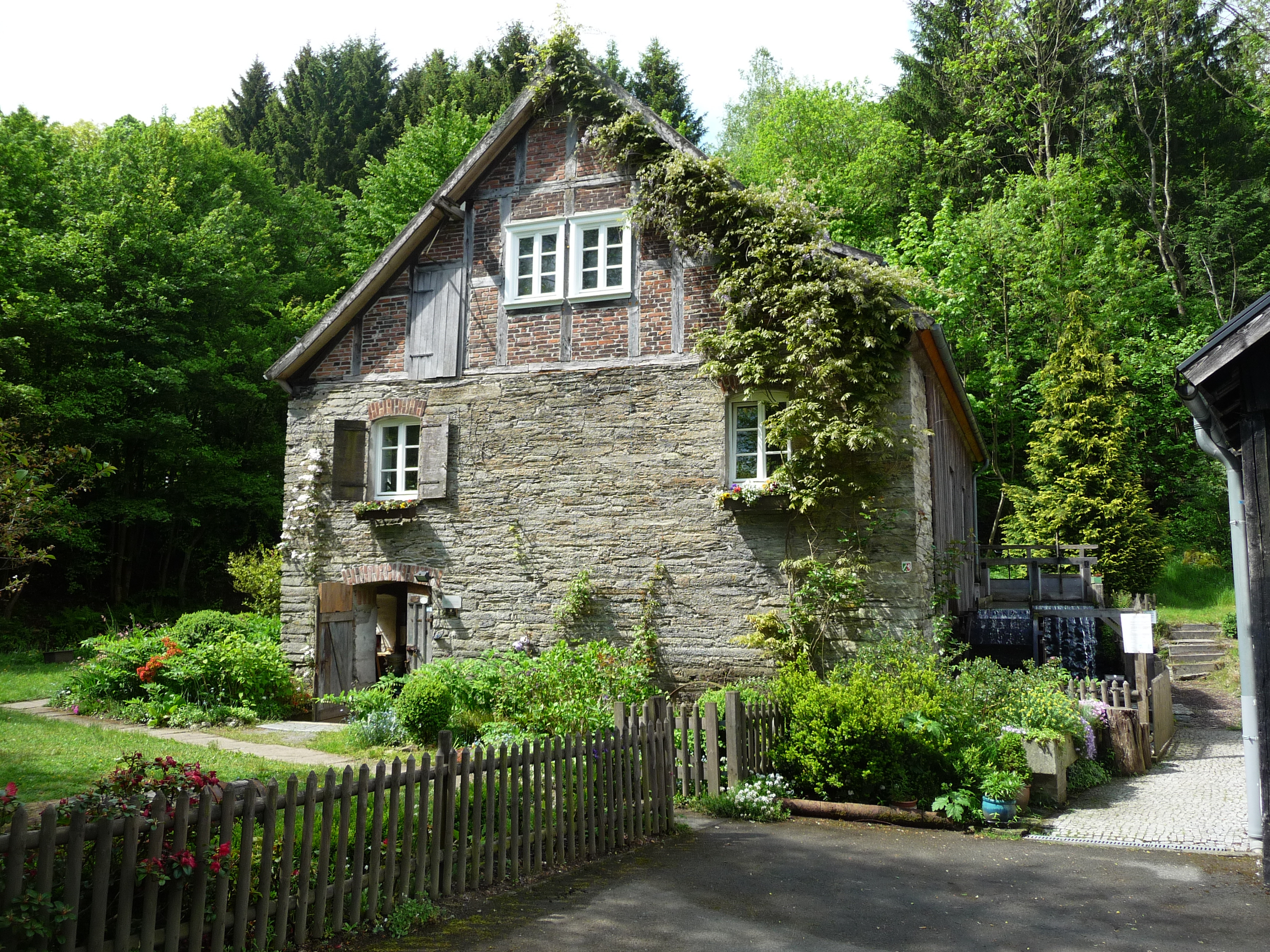 Die Alte Kornmühle in Ramsbeck, erbaut um 1600, restauriert und wiedereingeweiht 2014